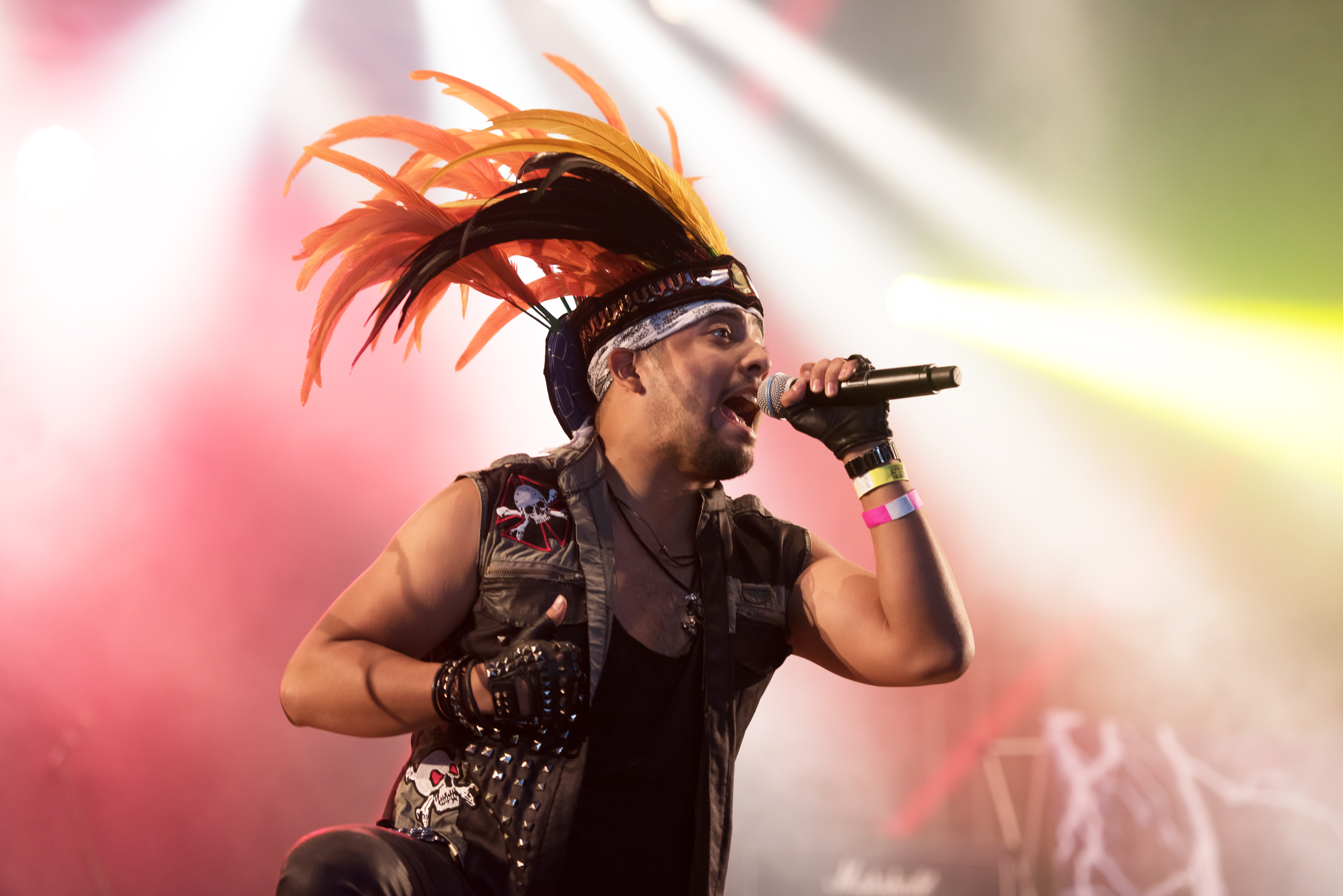 Jet Jaguar beim Wacken Open Air 2017